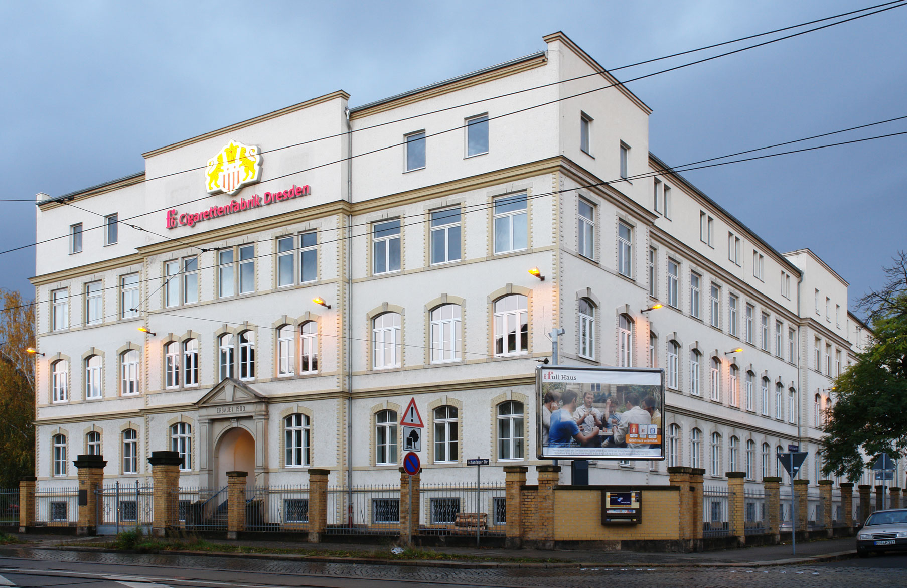 ältester Bauteil der Zigarettenfabrik Jasmatzi in Dresden-Striesen, Schandauer Straße 68 / Gottleubaer Straße